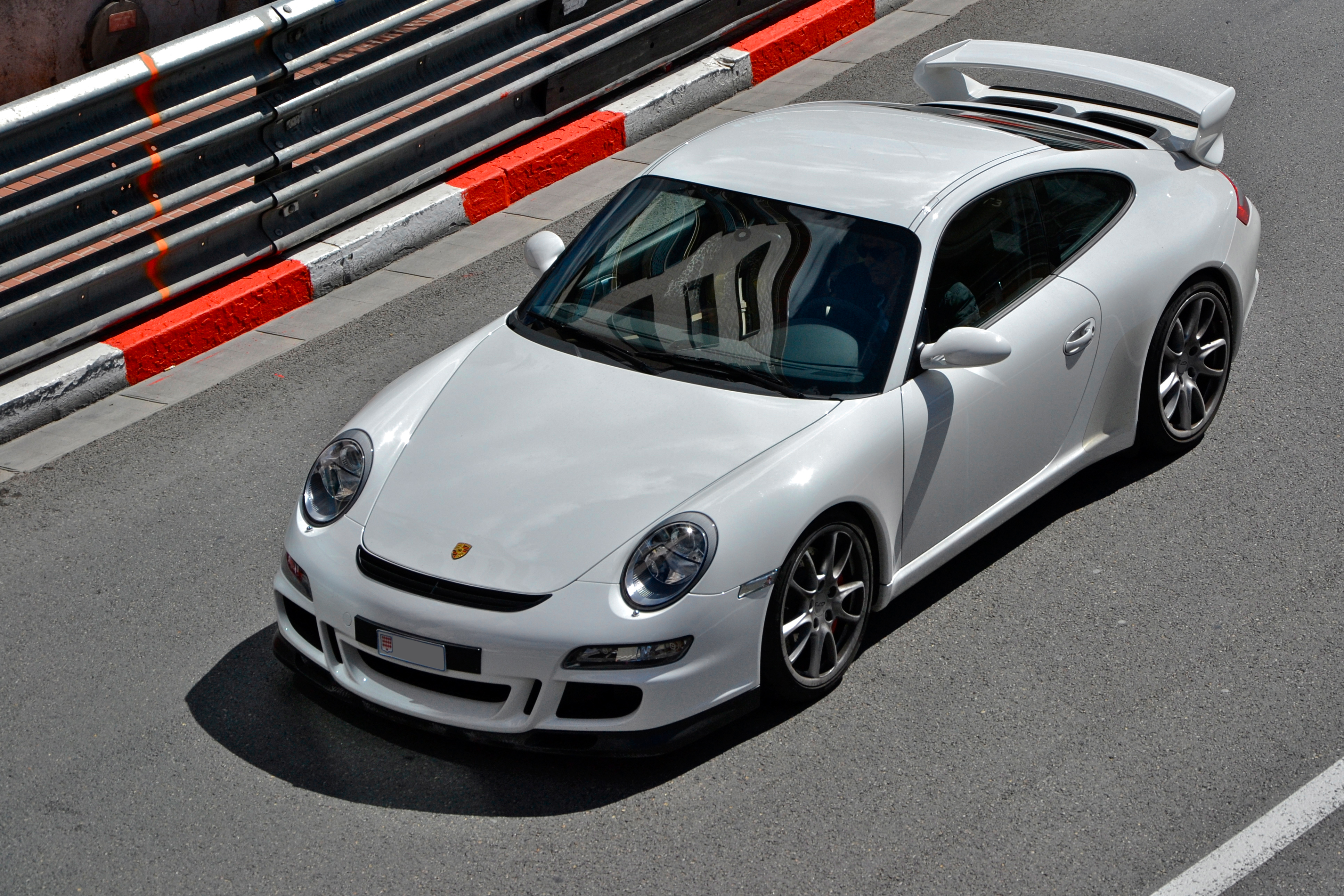 Porsche 911 GT3